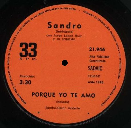 Senccillo "Yo te amo" sin marcas. Tomada del disco